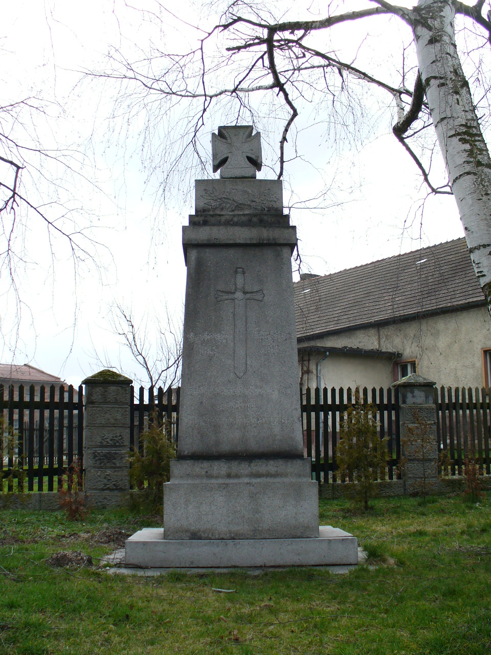 Wawelno (Górny Śląsk) - Bowallno (Oberschlesien) Pomnik poległych z I wojny światowej - Kriegerdenkmal